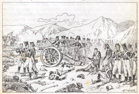 «Подвиг майора Витязя»